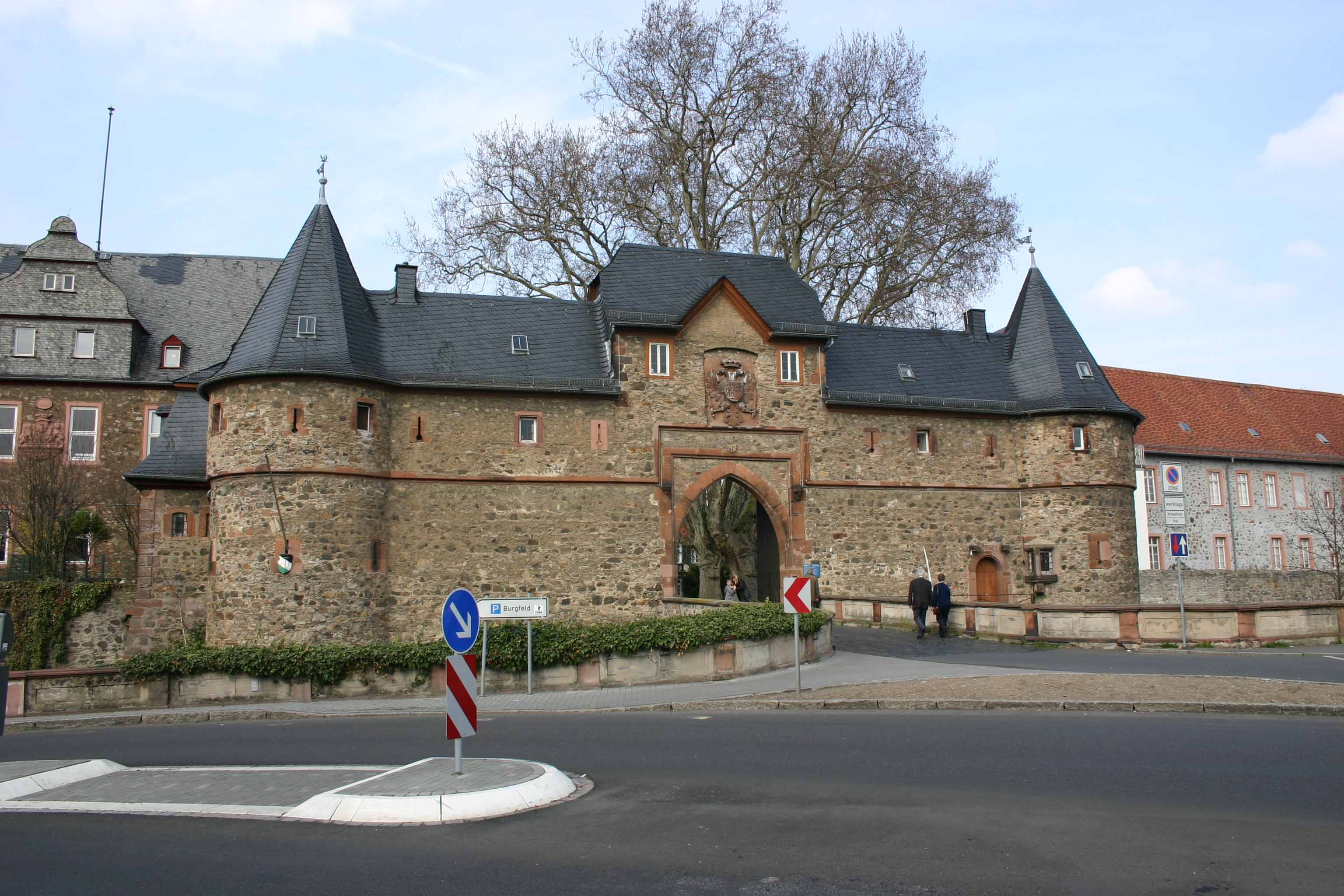 Eingangstor zur Burg in Friedberg. Die Burg Friedberg ist eine der größten Burganlagen Deutschlands in der hessischen Stadt Friedberg.